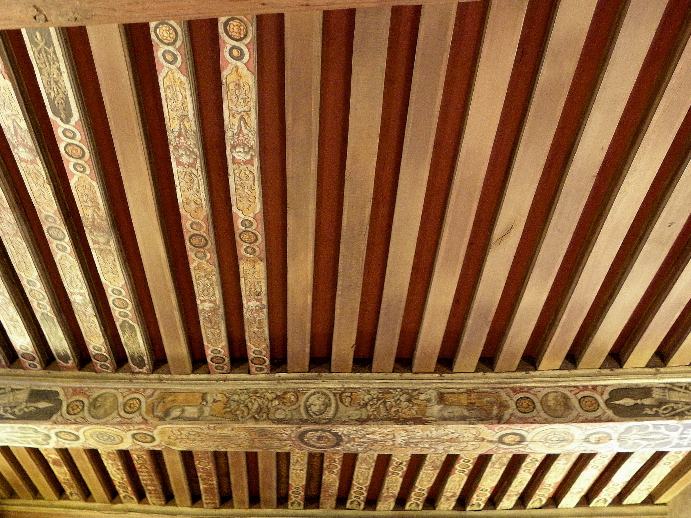 Plafond de la salle de lecture de la Bibliothèque historique de la Ville de Paris, Hôtel d'Angoulême Lamoignon, Paris (75004).